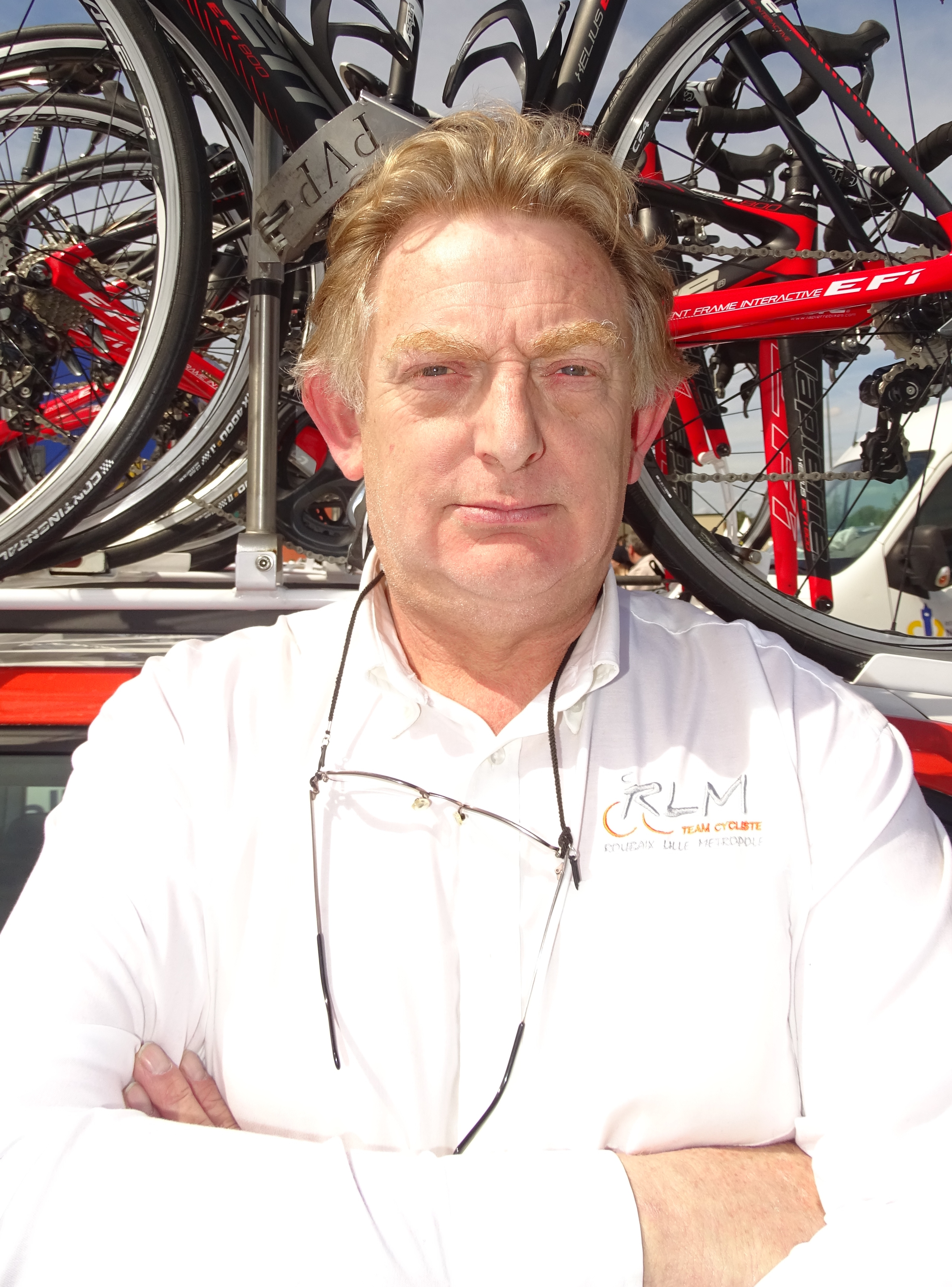 Reportage réalisé le vendredi 8 mai 2015 à l'occasion du départ de la troisième étape des Quatre jours de Dunkerque 2015 à Barlin, Pas-de-Calais, Nord-Pas-de-Calais, France. Depicted person: Frédéric Delcambre Depicted team: Roubaix Lille Métropole